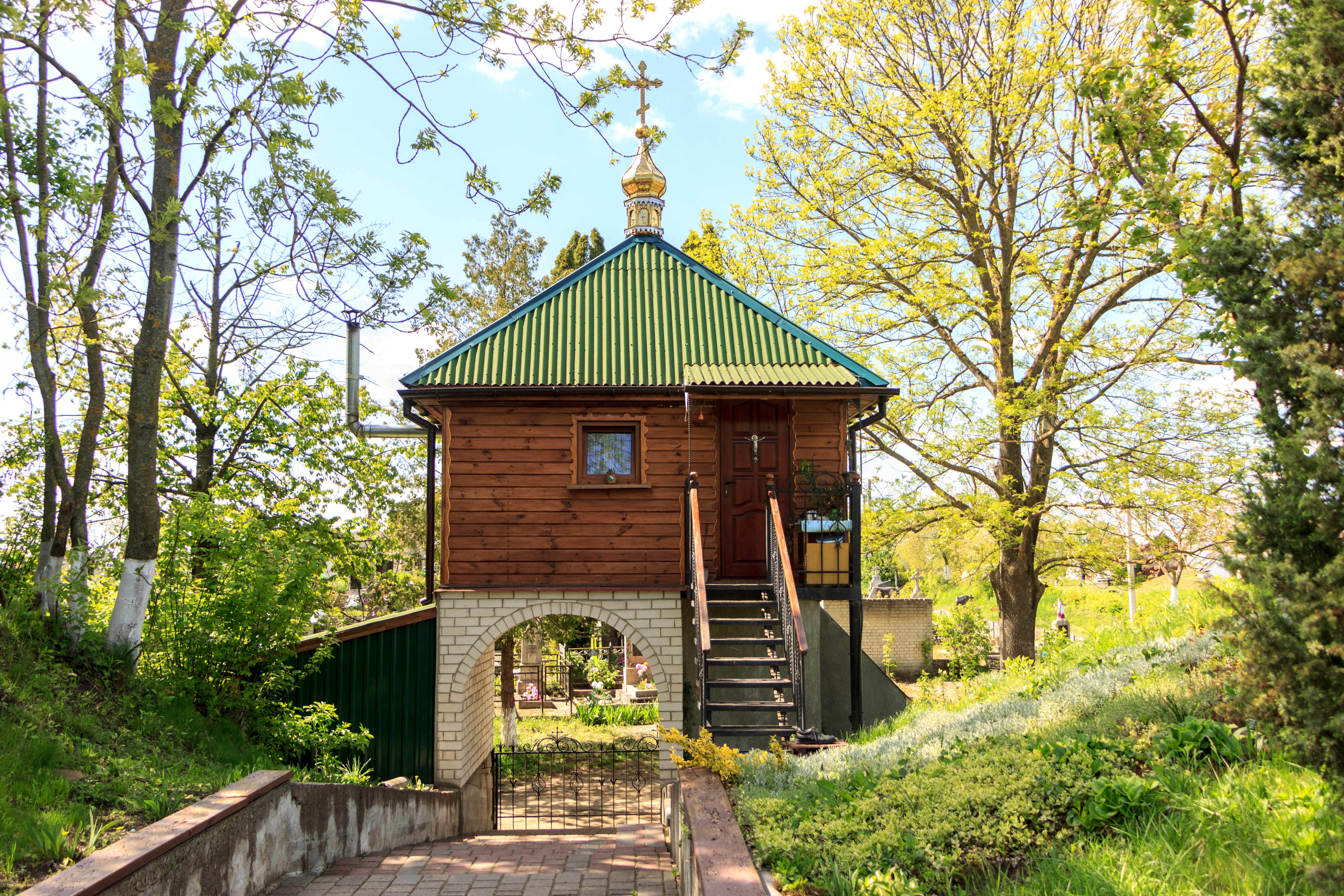 Скит у Жидичині